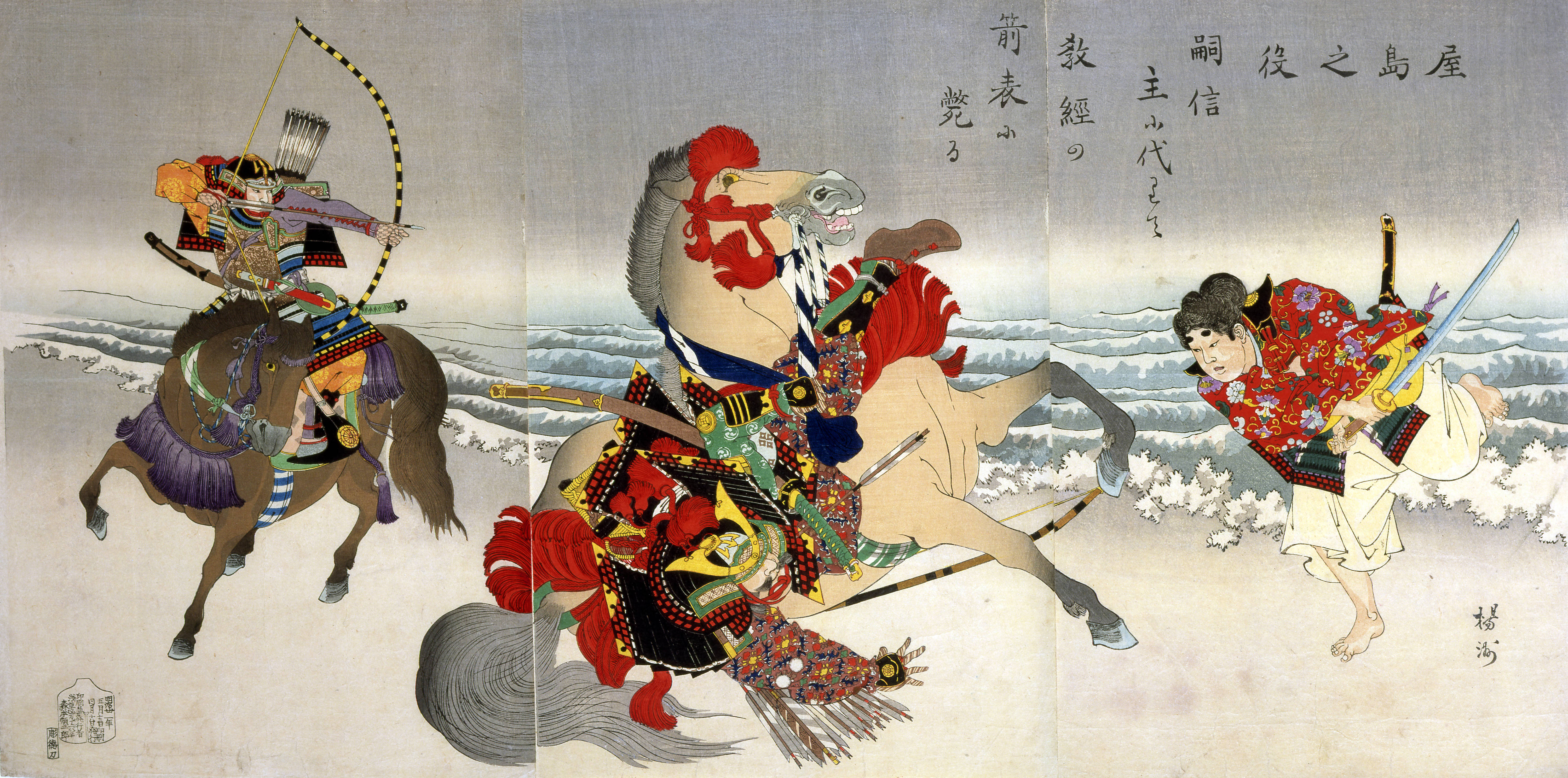 楊洲筆「屋島之役」、3枚揃大判錦絵 Protecting his master, Tsugunobu is felled by Noritsune's arrow. Taira no Noritsune aiming his bow at Minamoto Yoshitsune, but hitting Satō Tsugunobu, who rode between to protect Yoshitsune. Noritsune's servant Kikuo is running forward to behead Tsugunobu. Ink on paper, 14 5/8 in x 28 5/8 in (37.15 cm x 72.71 cm).